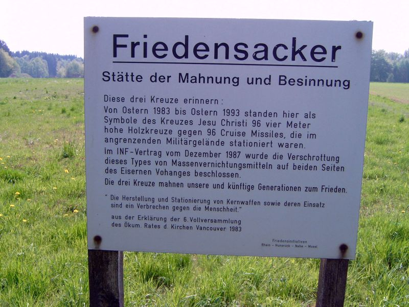 Beschreibung: Schild zwischen den Kreuzen am Friedensacker in der Nähe der ehemaligen Raketenbasis Pydna im Hunsrück Quelle: eigene Fotografie Fotograf: Achim Berg 07:53, 26 June 2006 (UTC) Datum: 9.5.2006